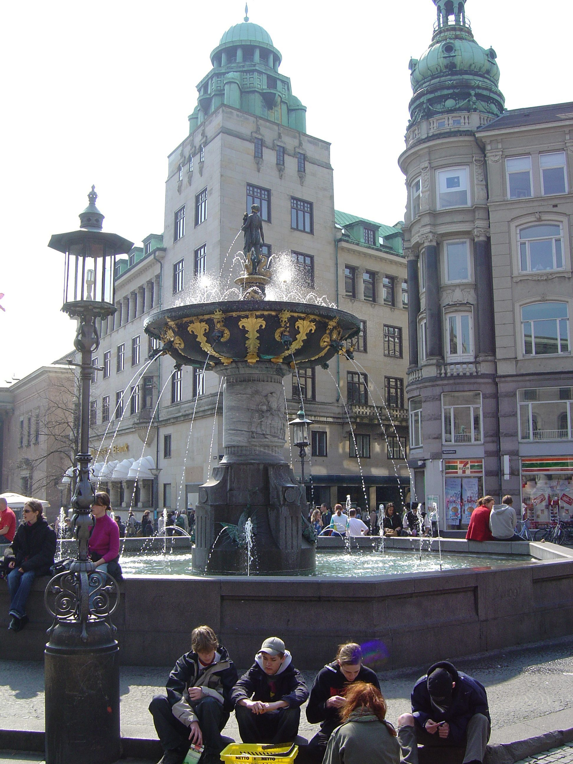 Caritas-brønden på Gammeltorv på Strøget i København